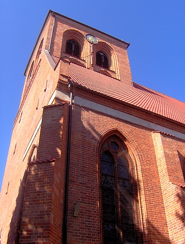 Kościół w Pucku, Puck, województwo pomorskie, lato 2006 Church in Puck, Pomorskie voivodeship, Poland, summer of 2006 Autor: Krzysztof